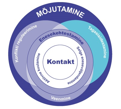 Komplekse suhtlusoskuse - tagasisidestamise - seosed ja koht teiste suhtlusoskuste hulgas